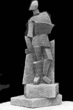 Д Якерсон. Спортсменка. 1920. Не сохранилась.